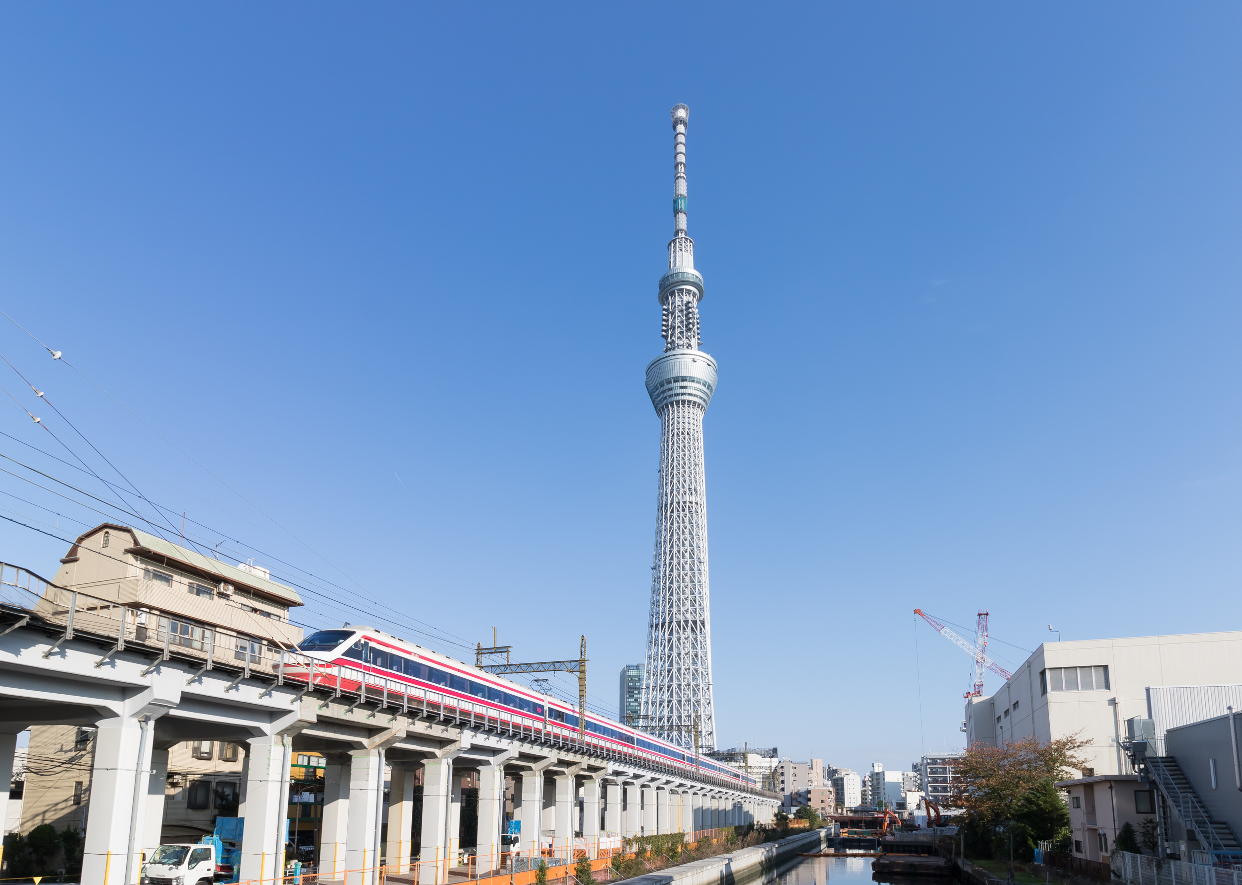 スカイツリーと東武鉄道200系（りょうもう）※ファイル名間違え。